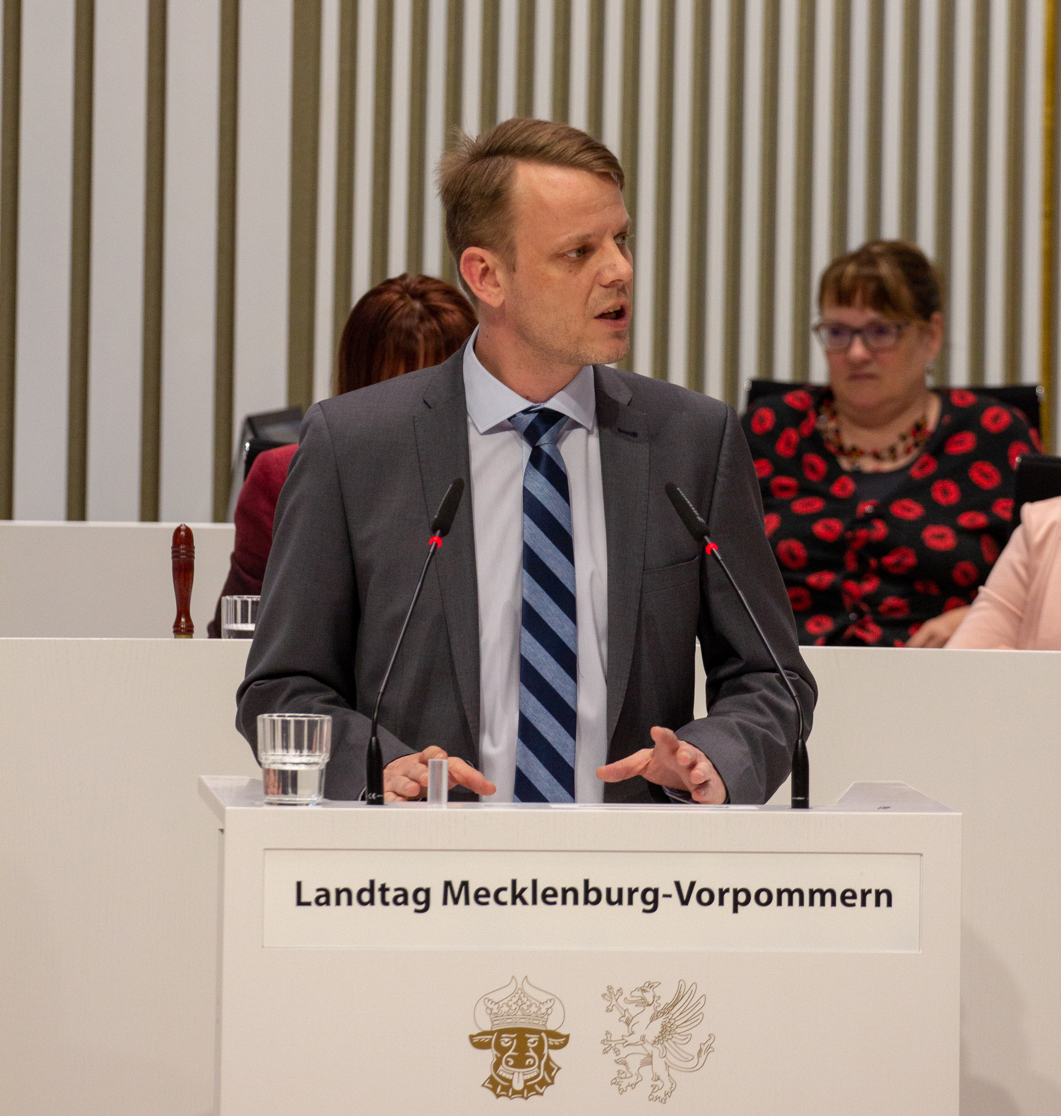 Nikolaus Kramer im Plenum des Landtages Mecklenburg-Vorpommern im März 2019.